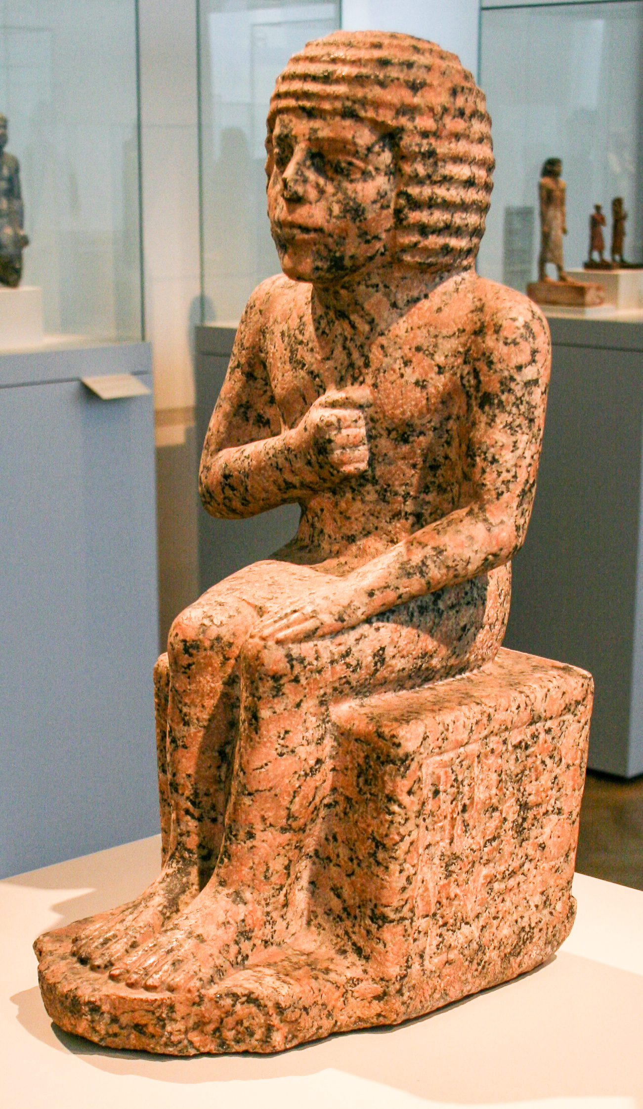 Sitzfigur des Domänenverwalters Metjen - Altes Reich, frühe 4. Dinastie, um 2600 v. Chr. - Rosengranit